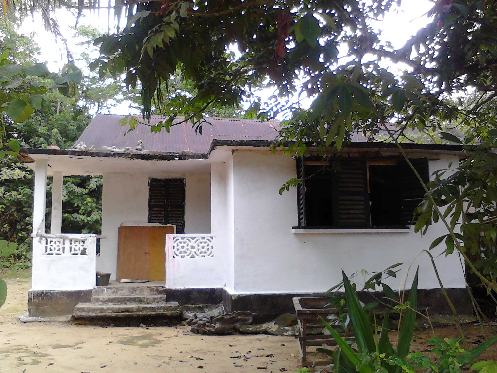 atelier de l'artiste Joel Mpah Dooh